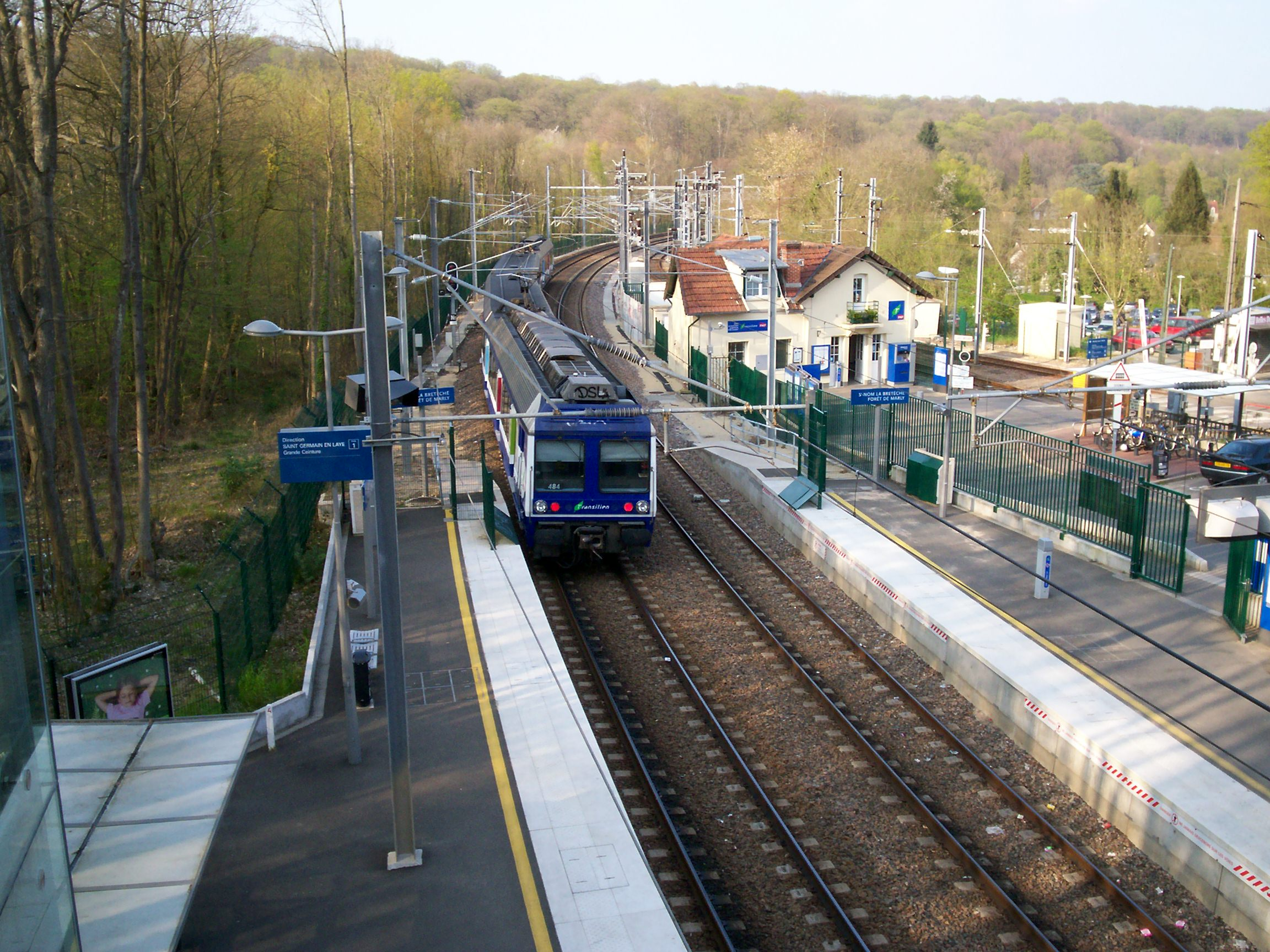 Vue aérienne du train GERM s'éloignant de Saint Nom GC